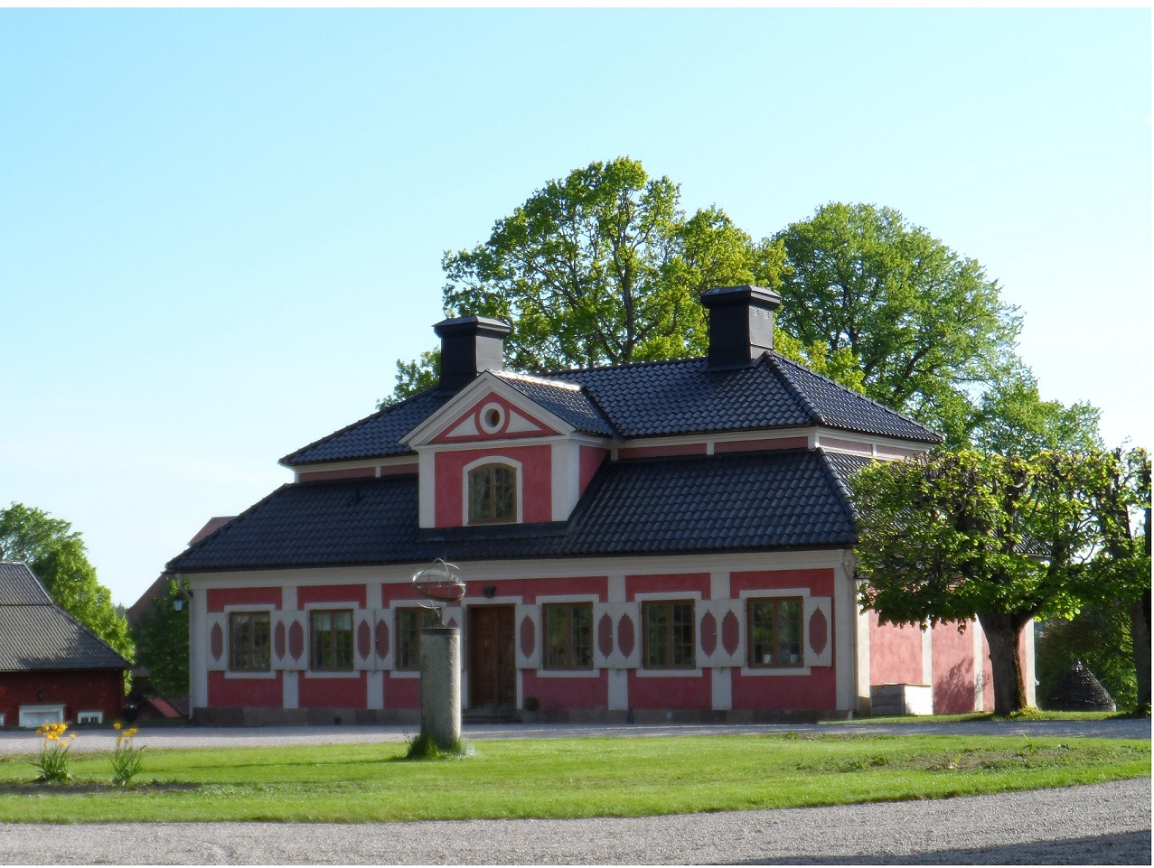 the west wing 2012